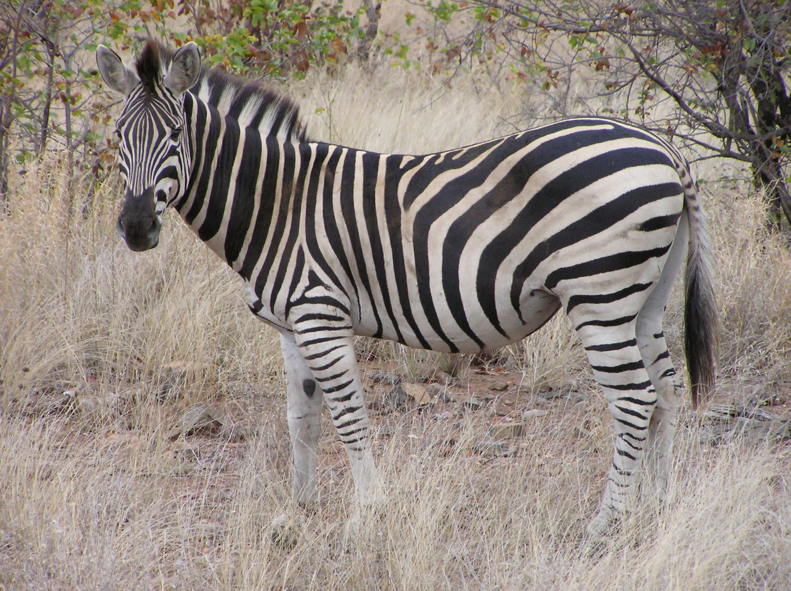 Zebra im Krugerpark in Südafrika